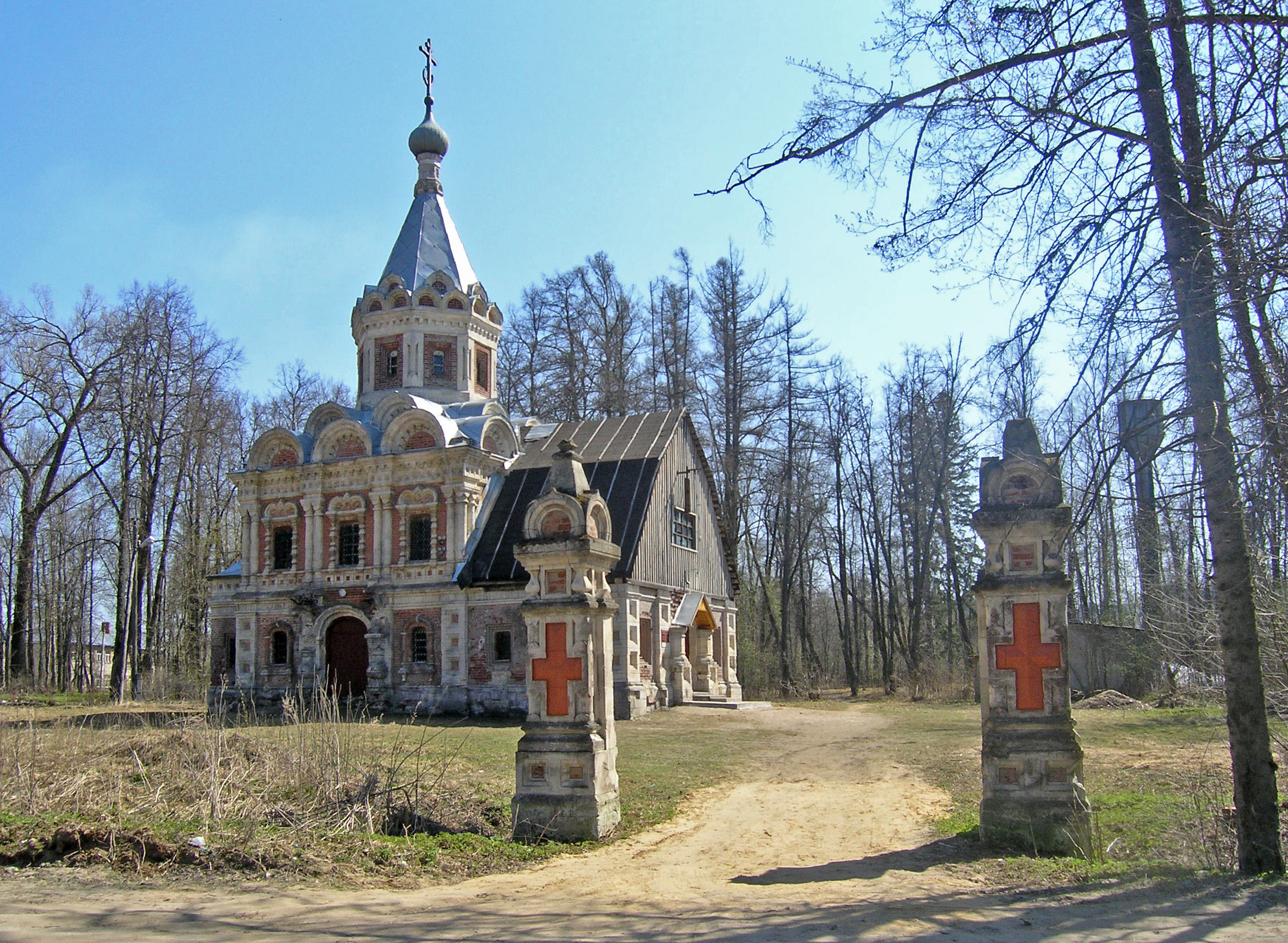 Церковь мученицы царицы Александры (Владимирская область, Судогда, посёлок Муромцево)